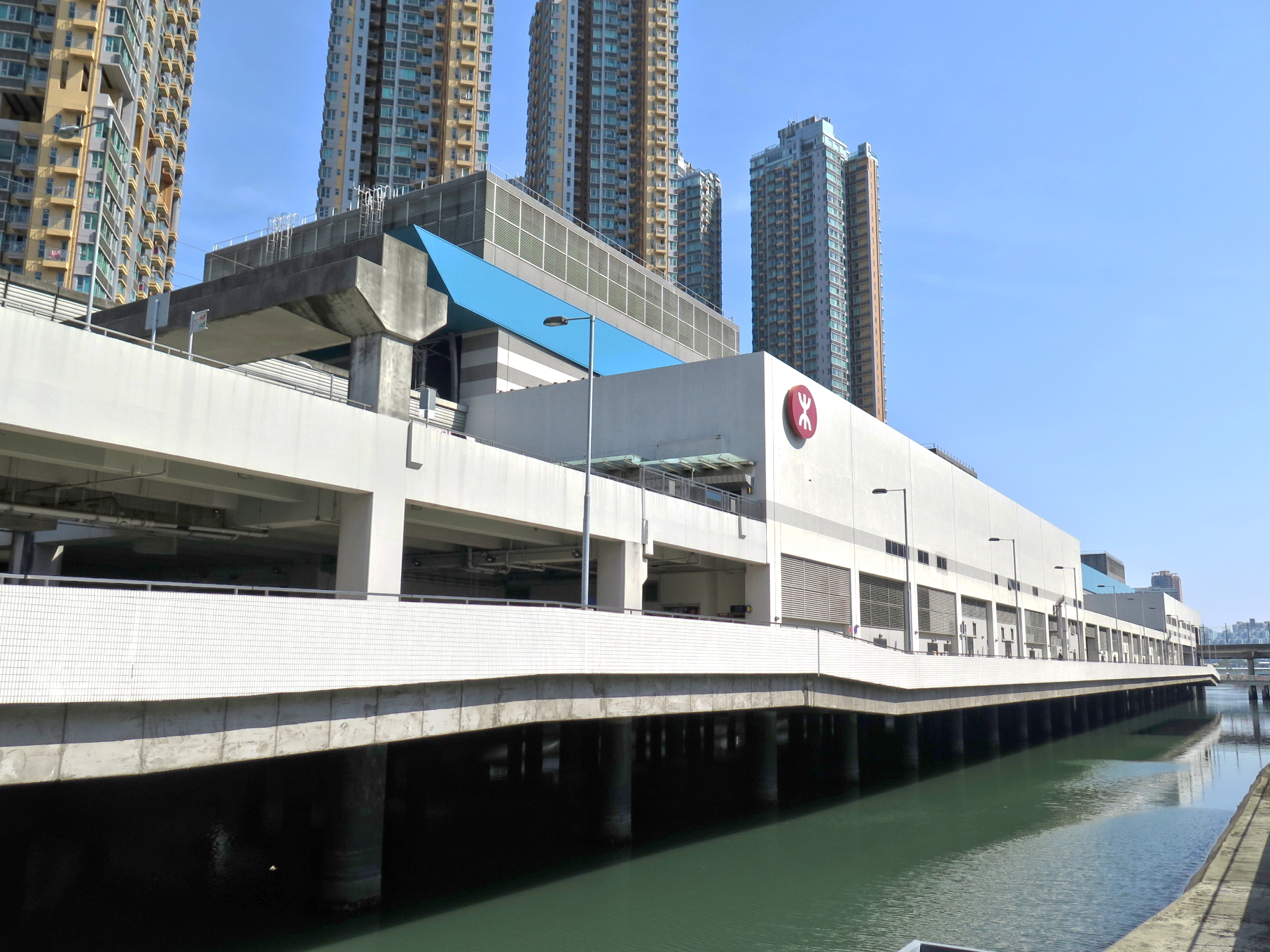 Tuen Mun Station Outside view